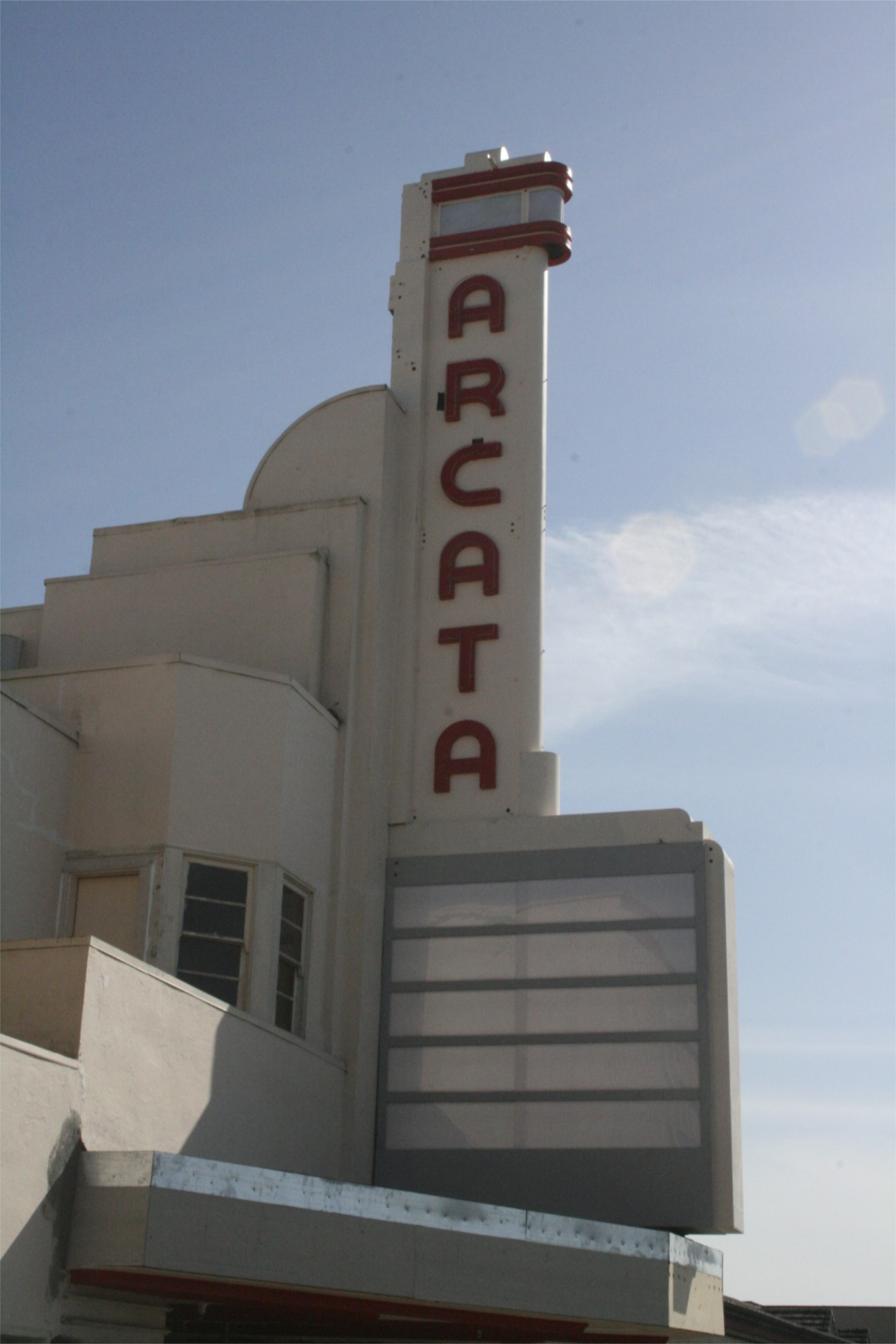 Marquee, Arcata Theatre, Arcata, California.